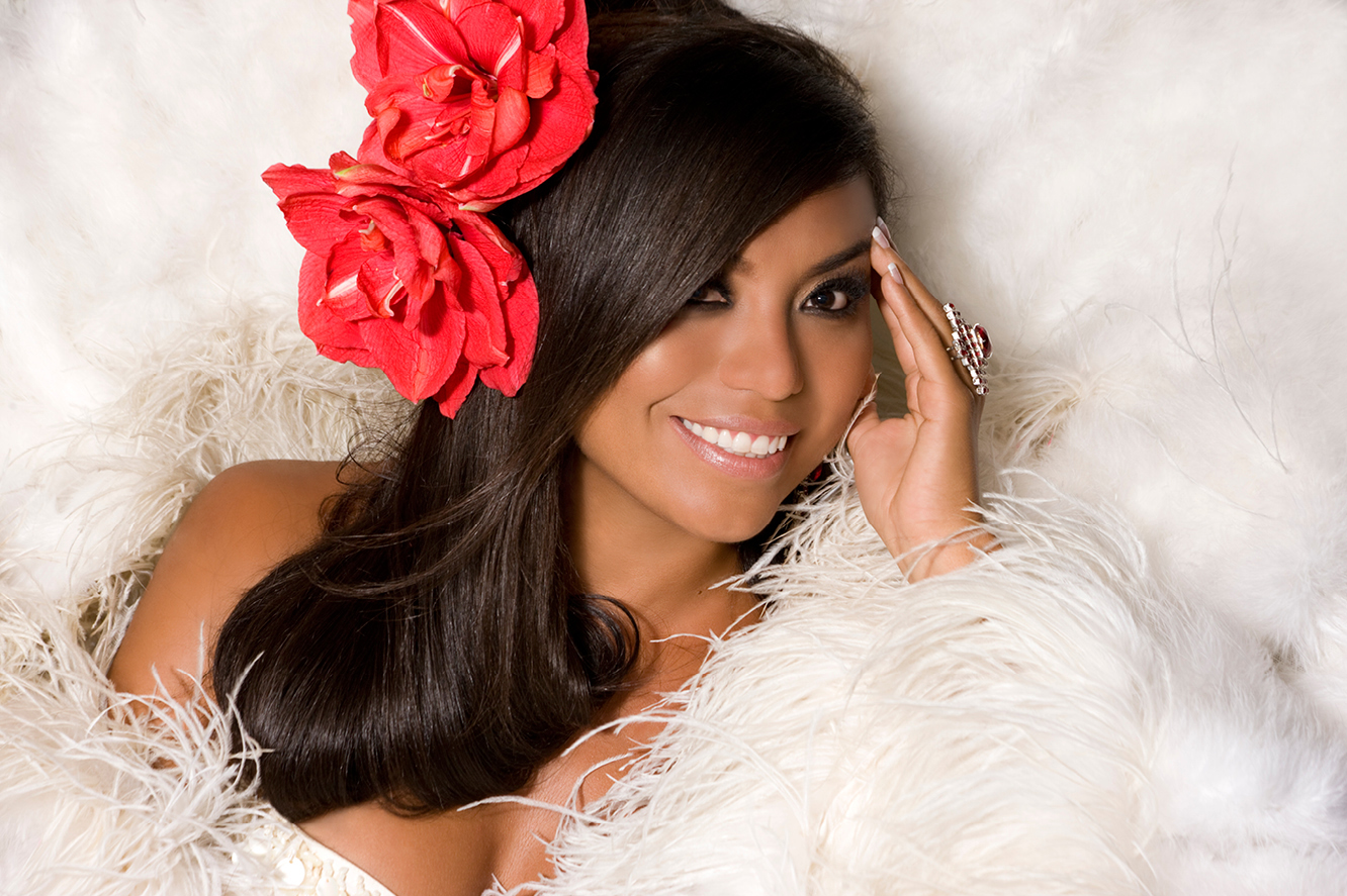 ´Sesión de fotos con Eugenia León